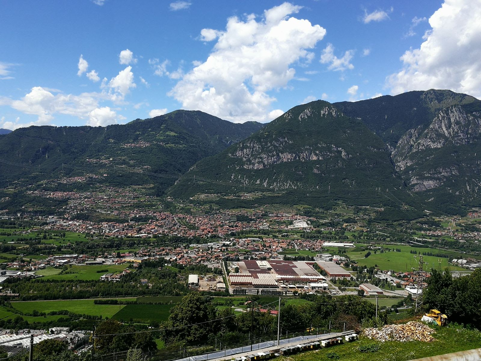 Veduta dall'alto della Tenaris Dalmine